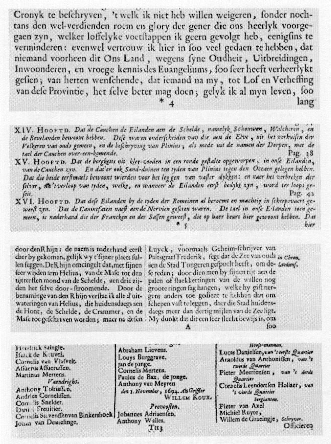 Katernsignaturen in de Cronyk van Zeeland van M. Smallegange